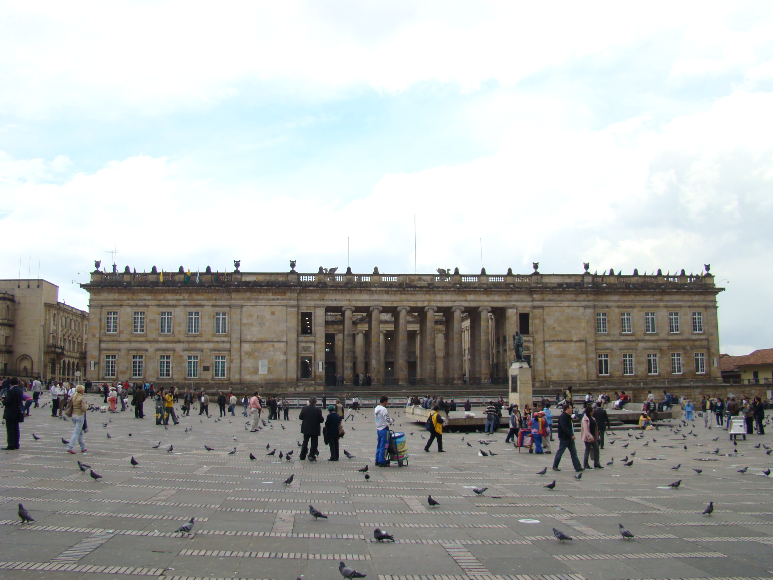 Palacio de Nariño...